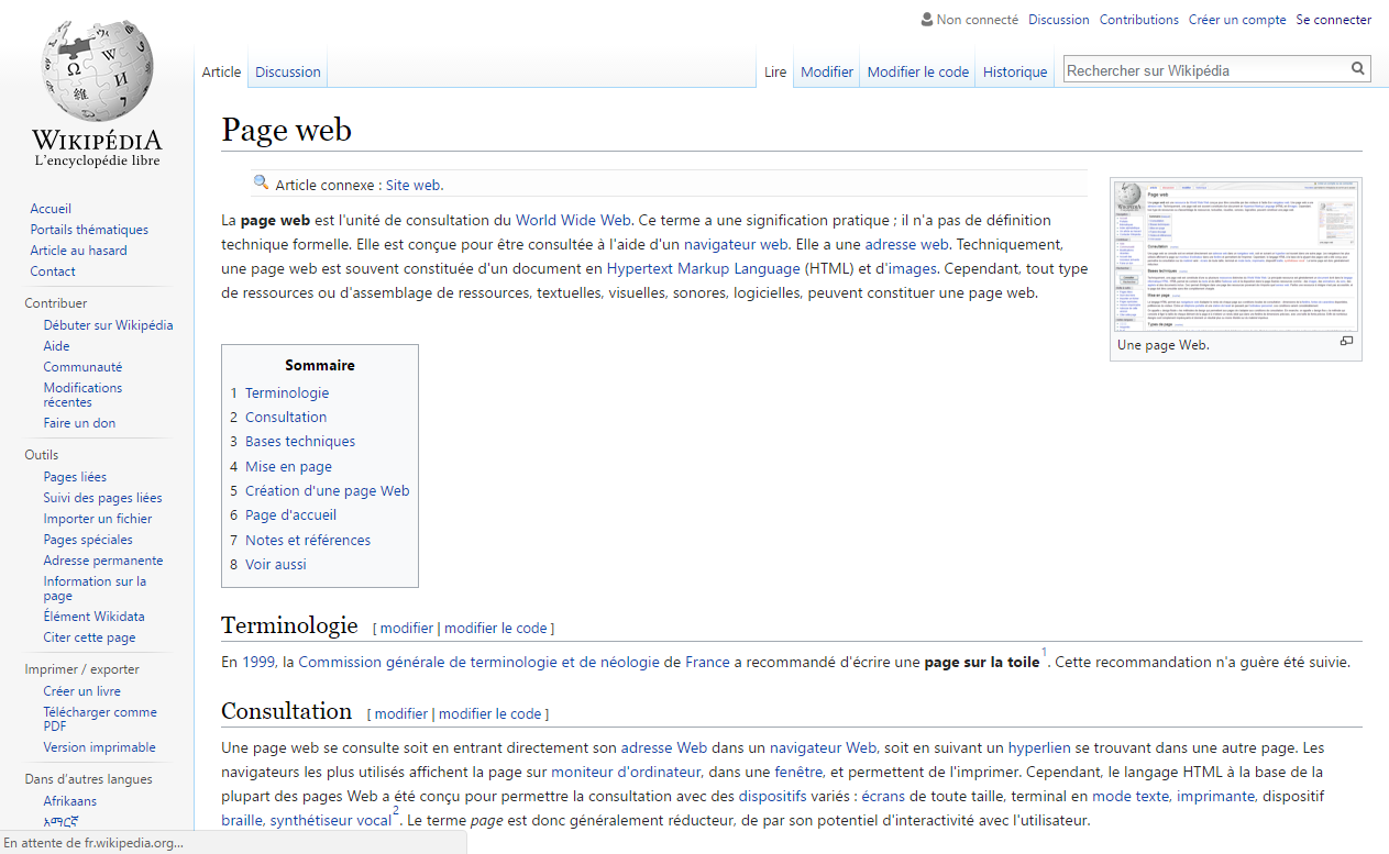 Capture de Wikipédia